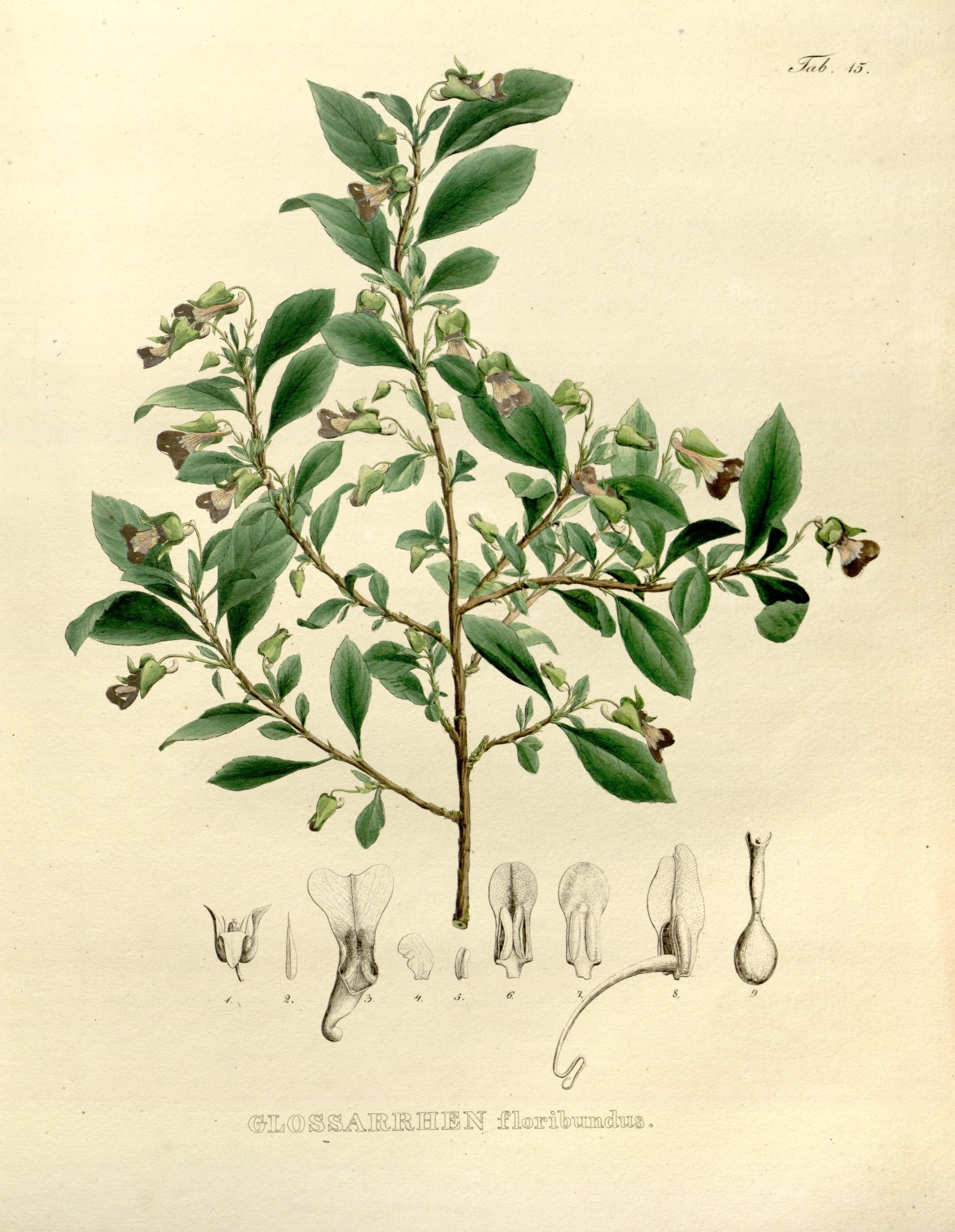 Glossarrhen floribundus = Schweiggeria fruticosa Nova genera et species plantarum. Monachii [Munich] :Impensis Auctoris,1824-1829 [i.e. 1824-32]..